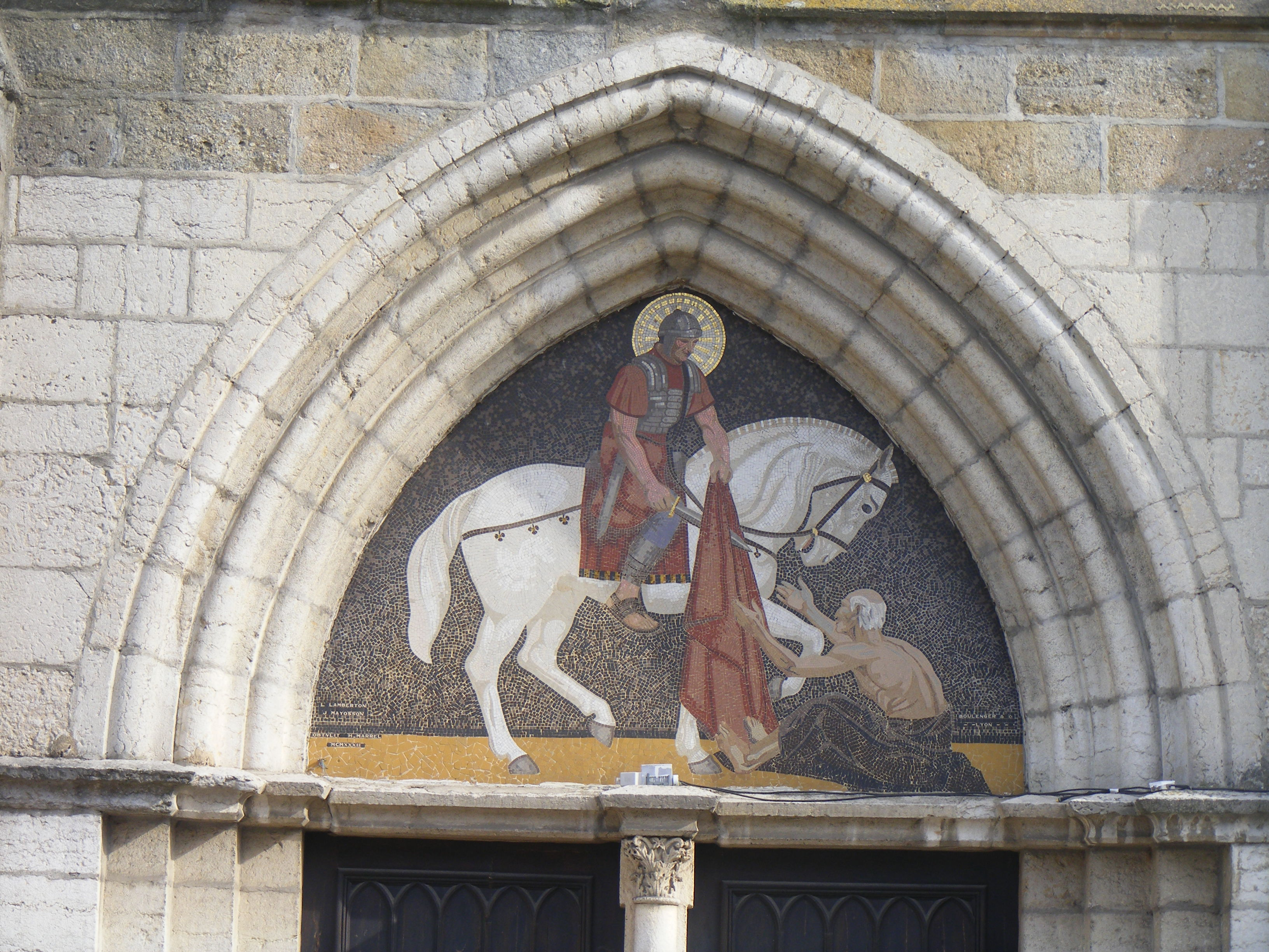 Mosaïque du tympan de l' église représentant saint Martin partageant son manteau. Saint-Martin-la-Plaine, Loire, France